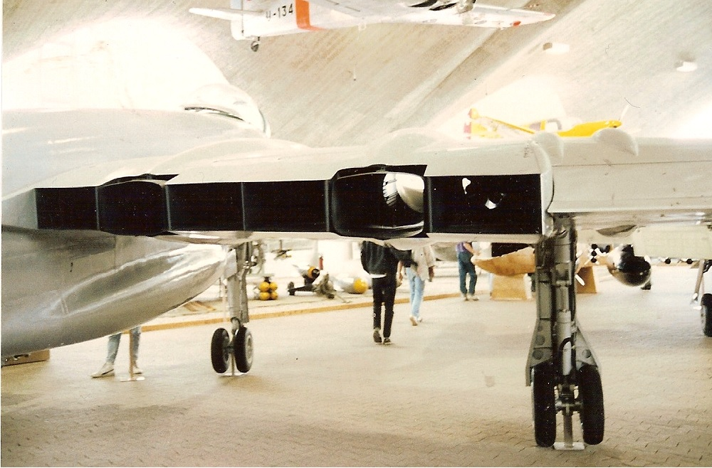 N-20hinten